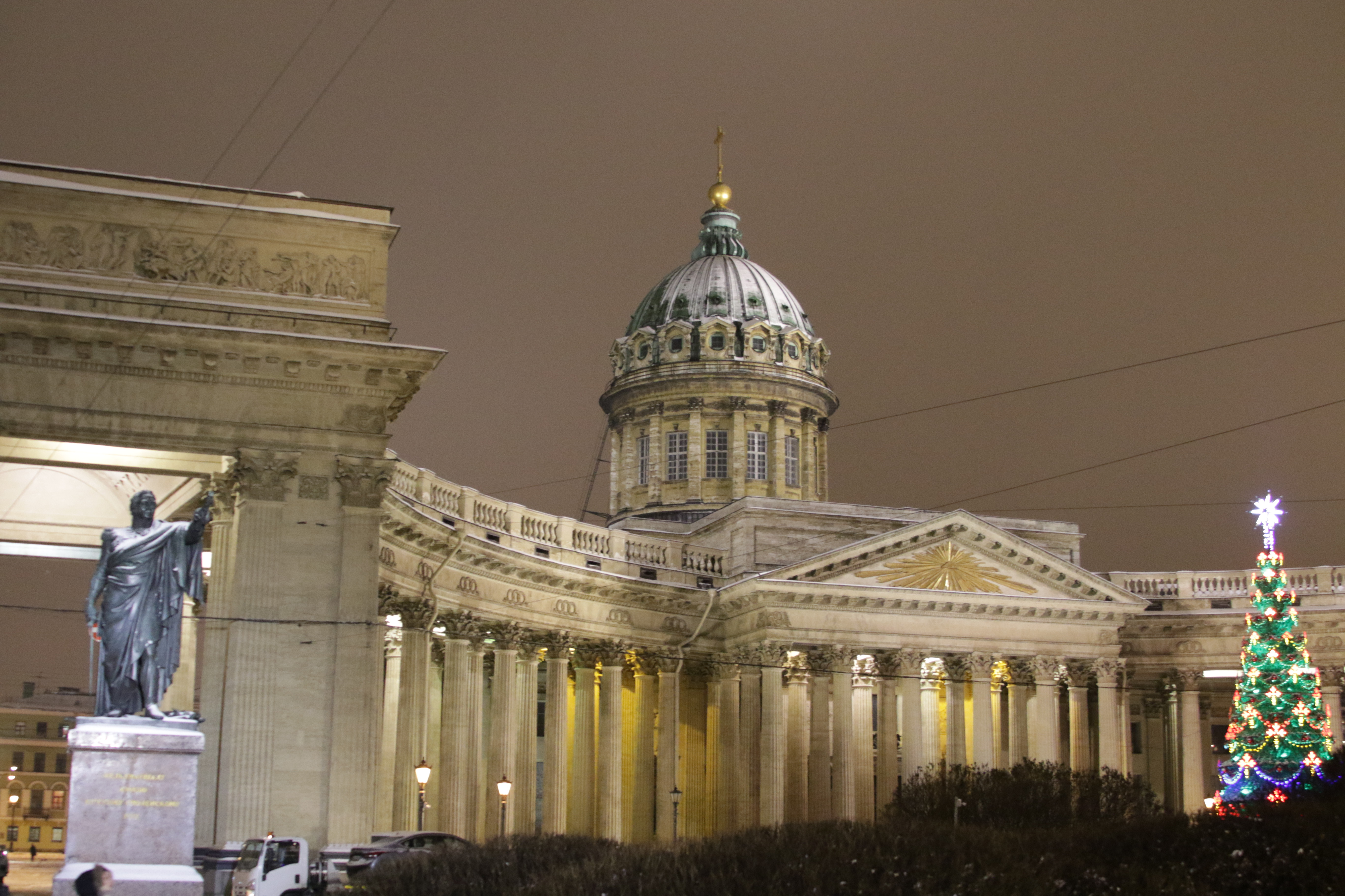 Казанский собор